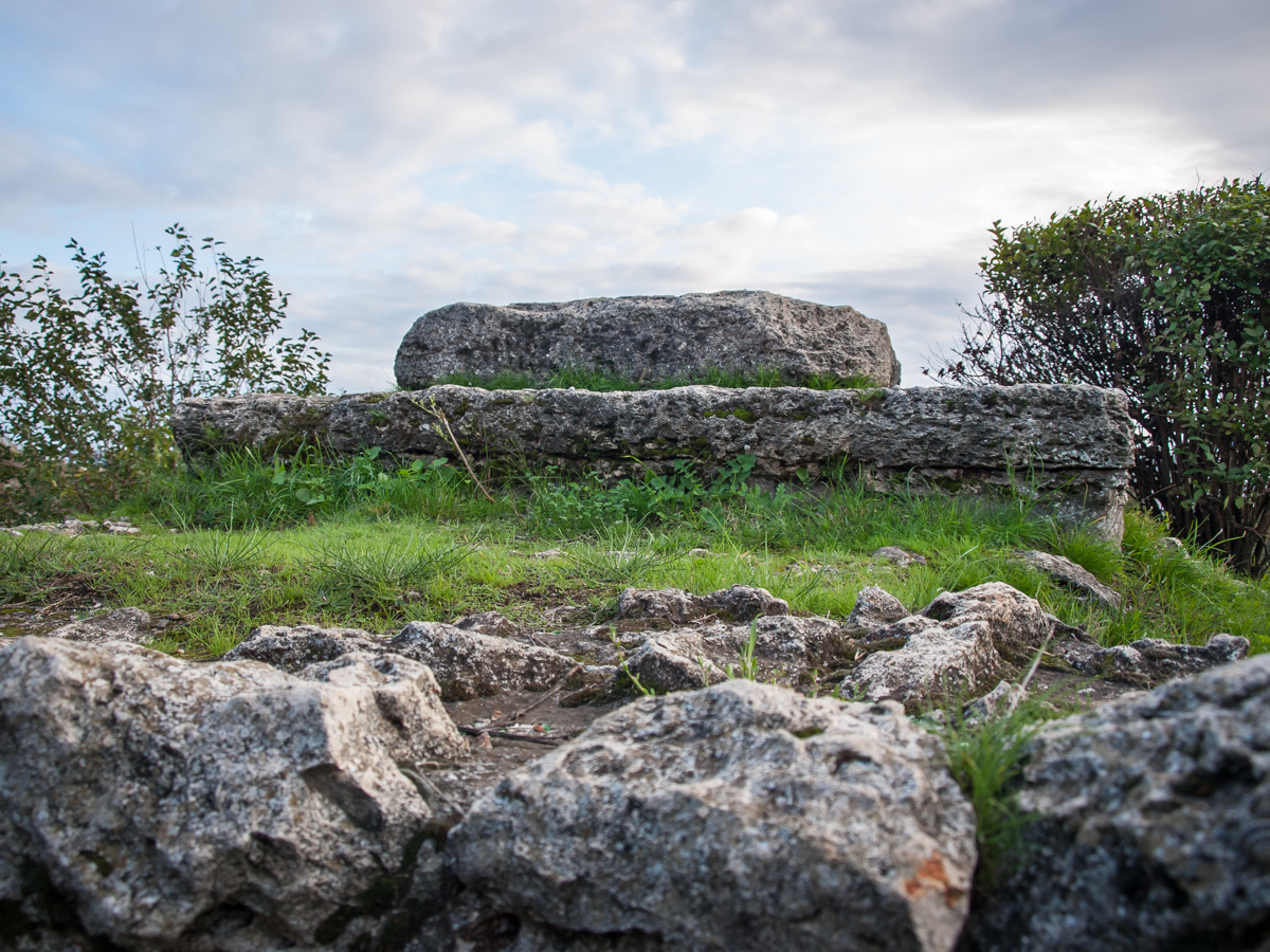 Turn de aparare - Bd. Termele Romane (fost Marinarilor) în dreptul Porții nr. 2 a portului comercial 11